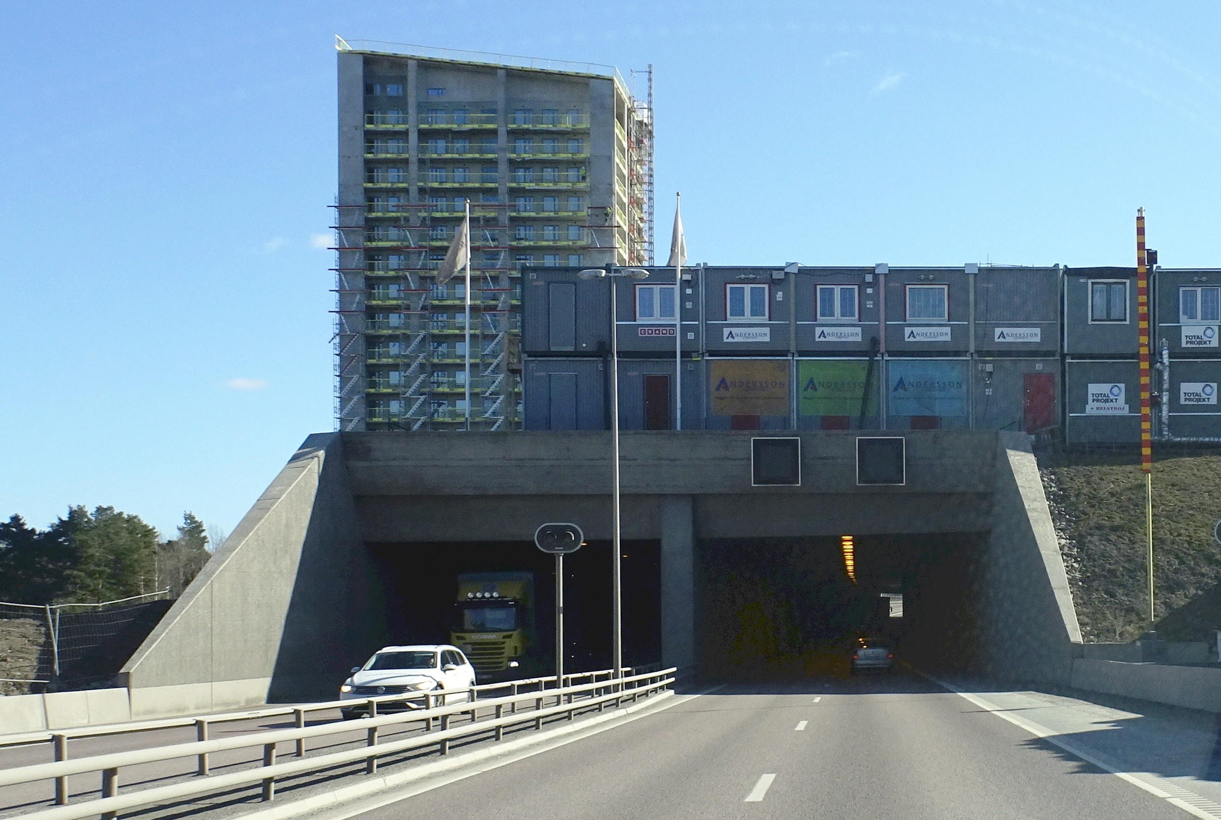 Rinkebytunneln, västra öppningen